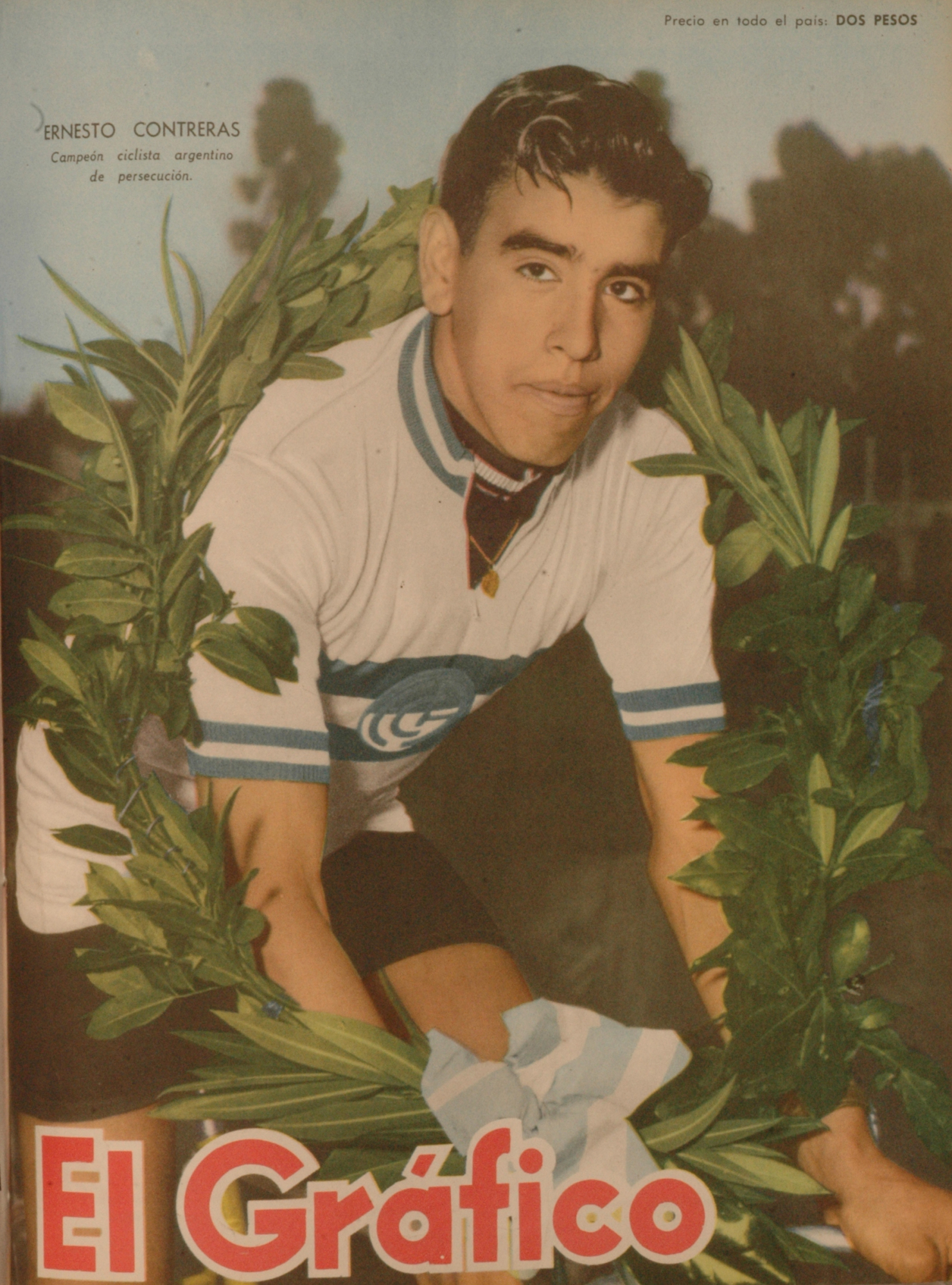 El Grafico del 09 de Noviembre de 1956. Edicion 1942